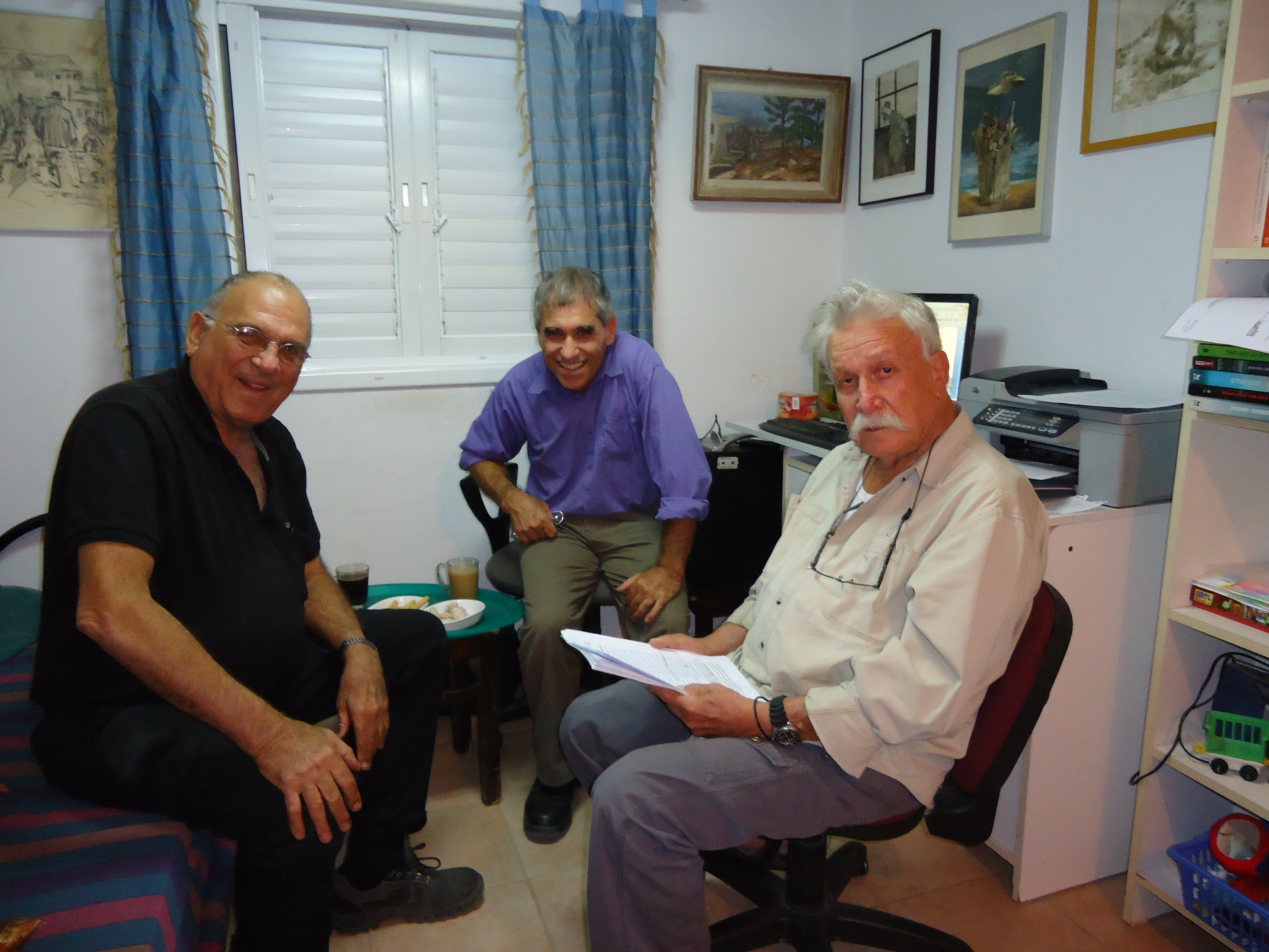 ותיקי האגודה מימין לשמאל שוקה שפירא אהוד (אודי) גלילי וחיים סתיו בפגישת עבודה